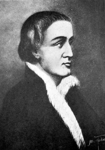 Paul de Chomedey, sieur de Maisonneuve (15 février 1612 - 9 septembre 1676) était un officier français. On lui doit la fondation de la ville de Montréal.